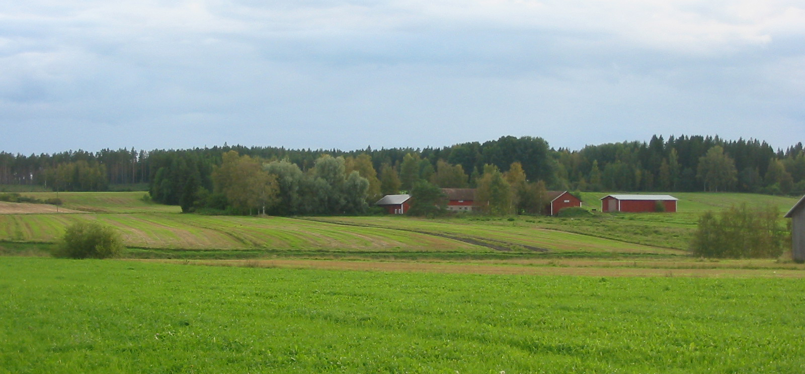 Kärilän kylää Somerolla nähtynä Paimionjoen yli Hämeen Härkätieltä Pyölin suunnasta.